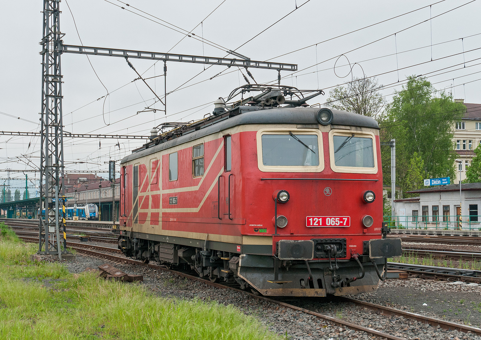 Lokomotiva 121.065 soukromé společnosti IDS Cargo v Děčíně.